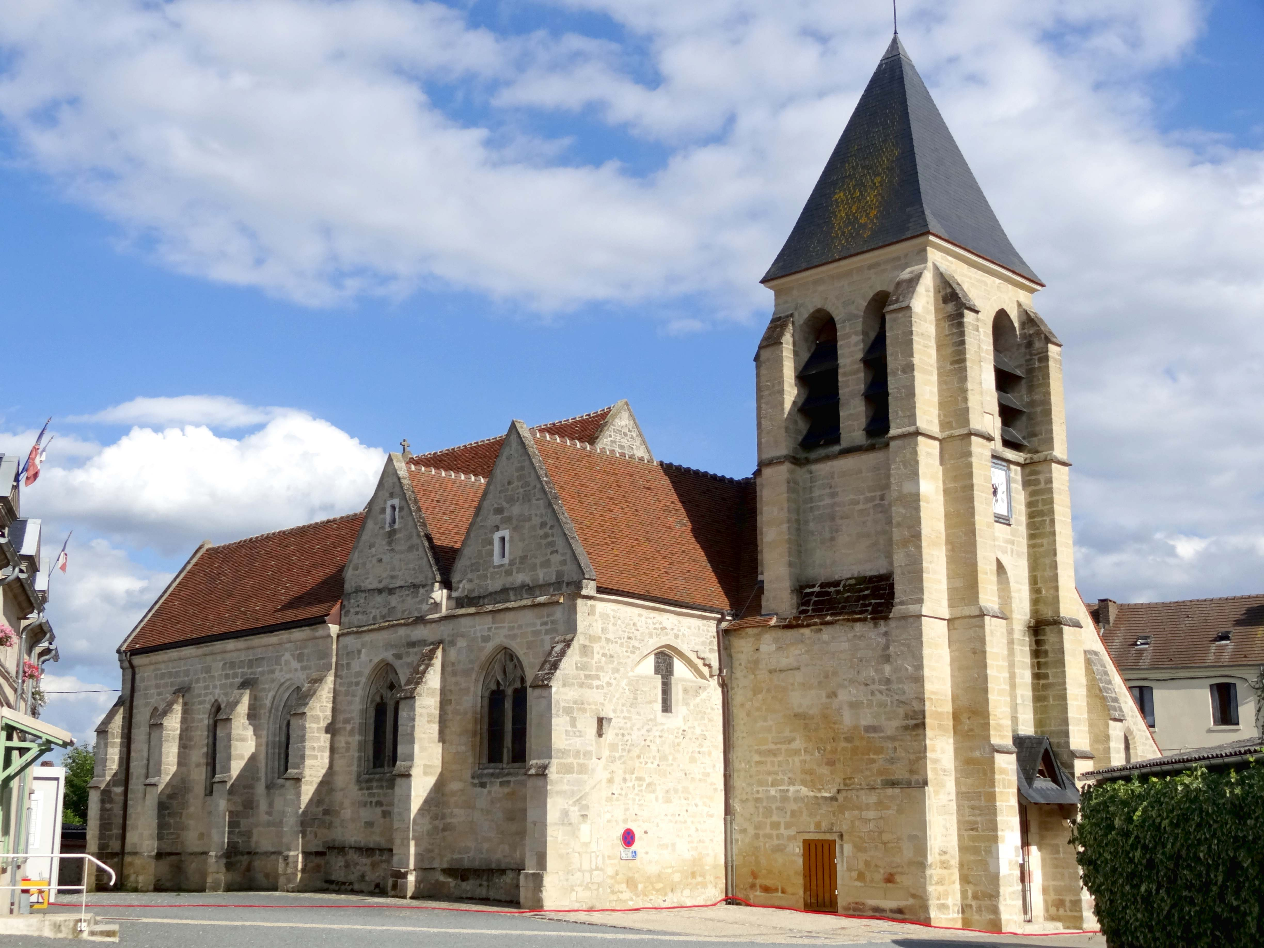 Vue depuis le nord-ouest.